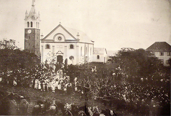 Procissão no Santuário de Caravaggio, Farroupilha